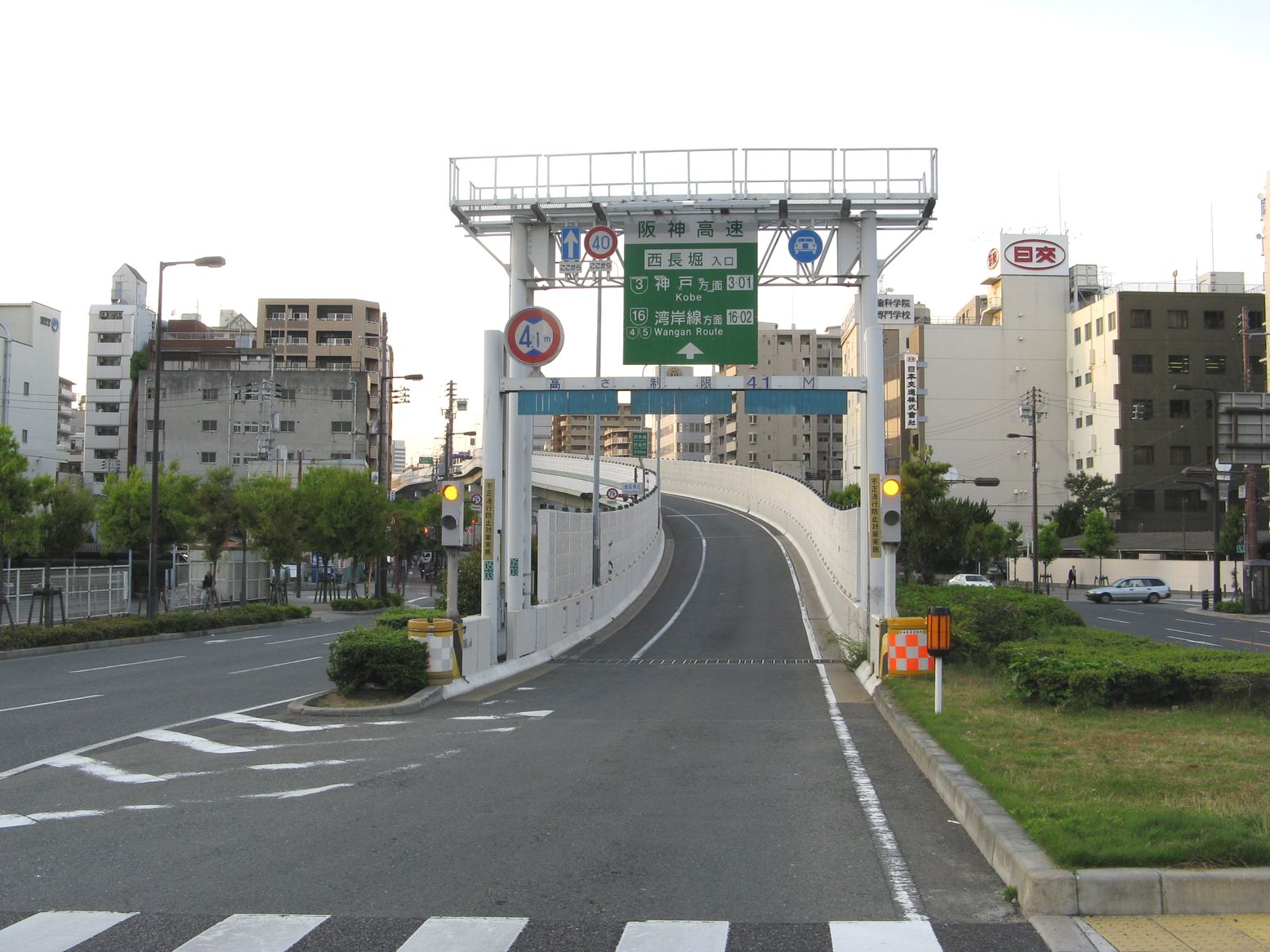 阪神高速西長堀出入口 鰹座橋交差点から入口を北望